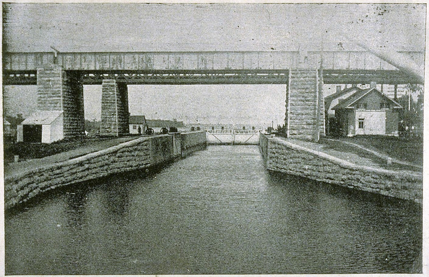 Sainte-Anne-de-Bellevue : écluse du canal et le pont du Grand-Tronc